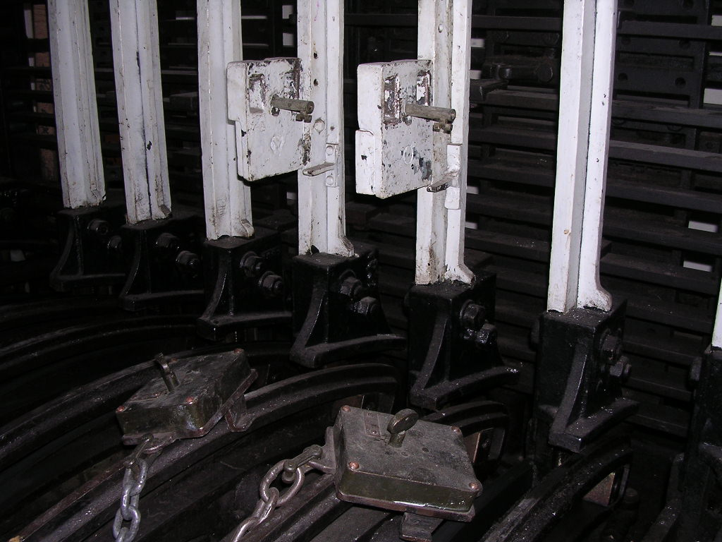 France - (Railway) Ligne de Tarascon à Narbonne - Gare de Nîmes - Poste 4 - Gros plan sur deux serrures à agrafe sur deux leviers de poste d'aiguillage de type Saxby